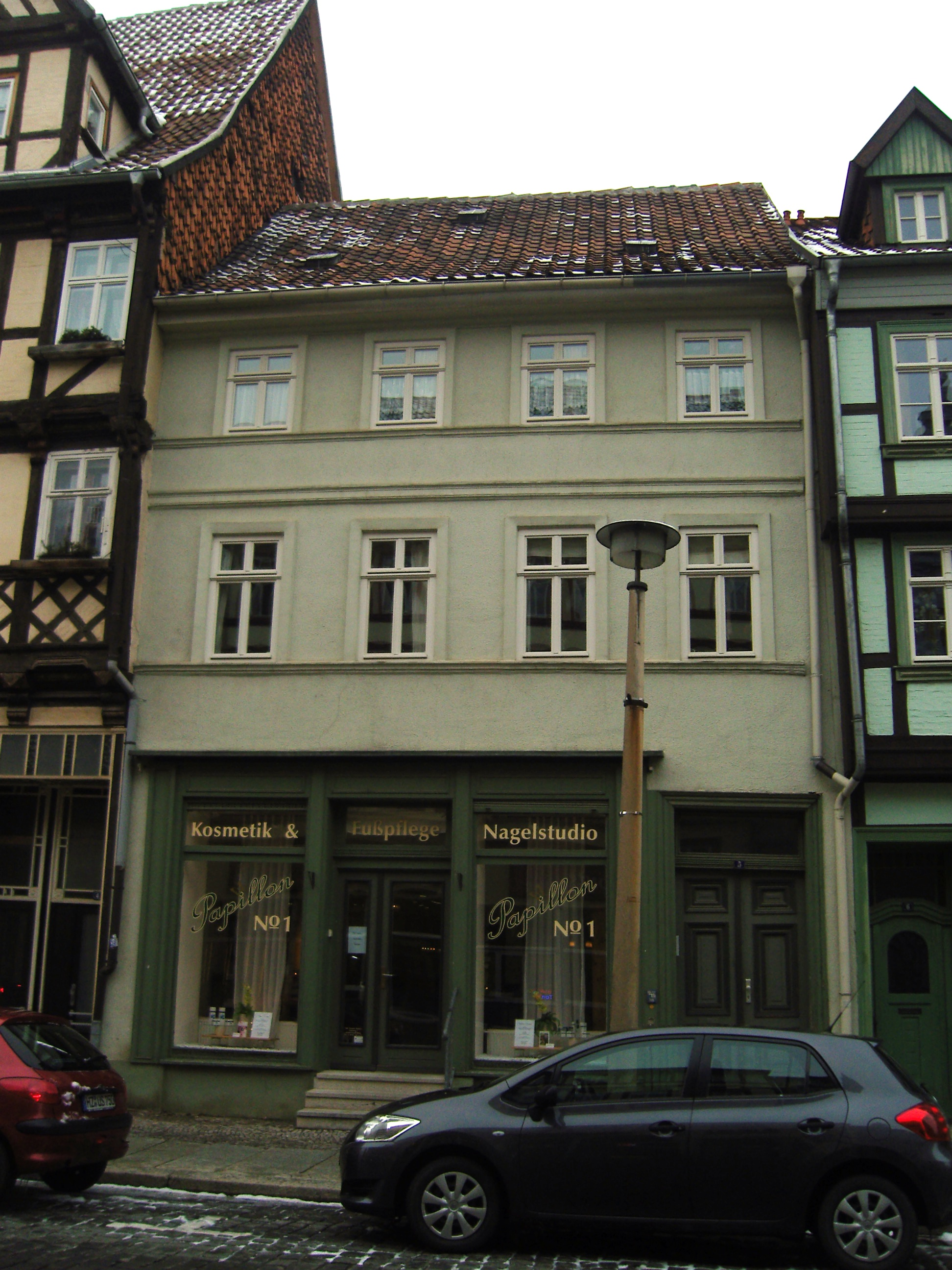 Denkmalgeschützter ehemaliger Bürgerhof im Steinweg 5 in Quedlinburg